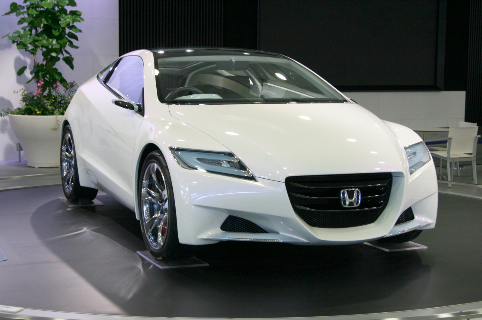 Honda CR-Z